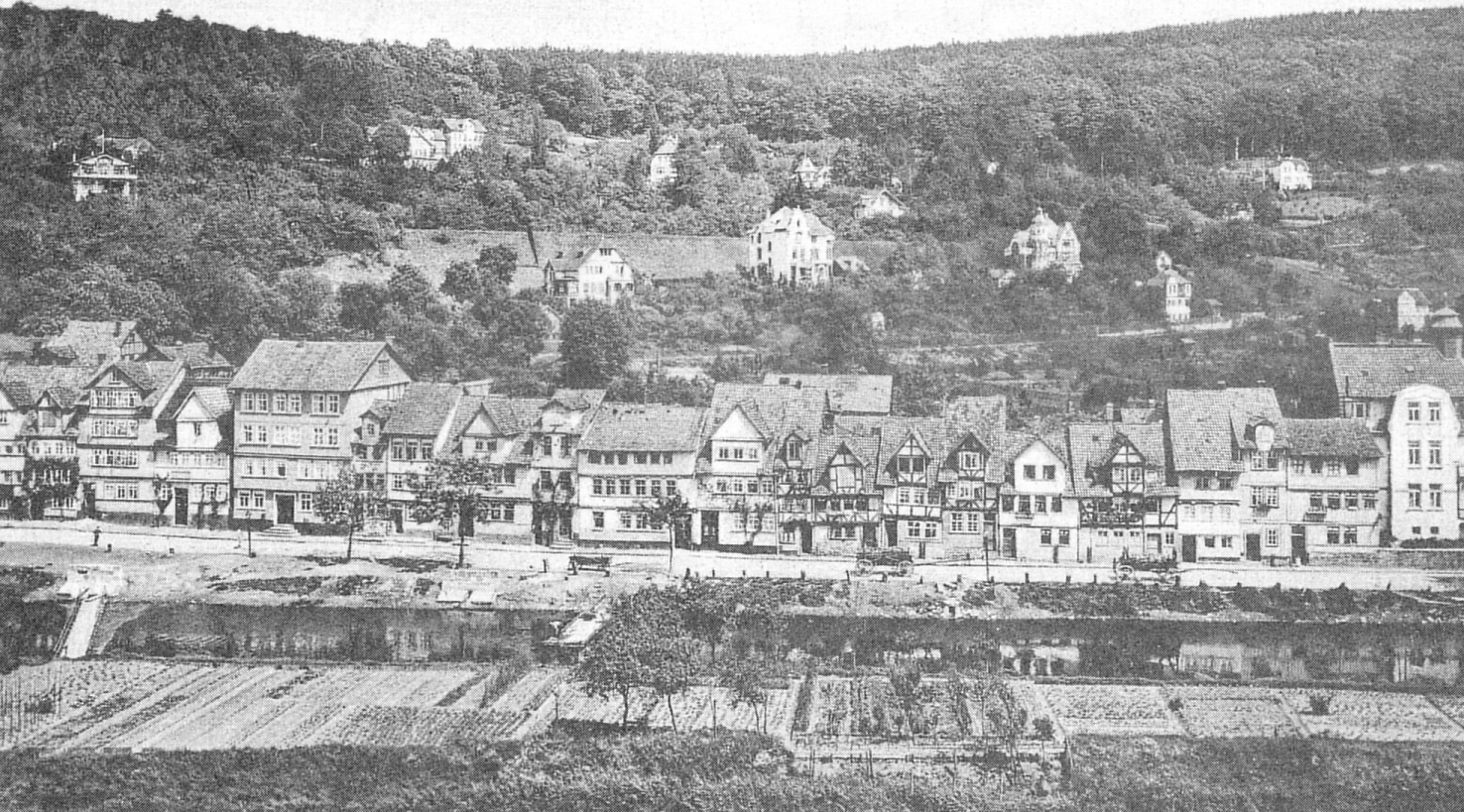 Blume und Blümer Werder